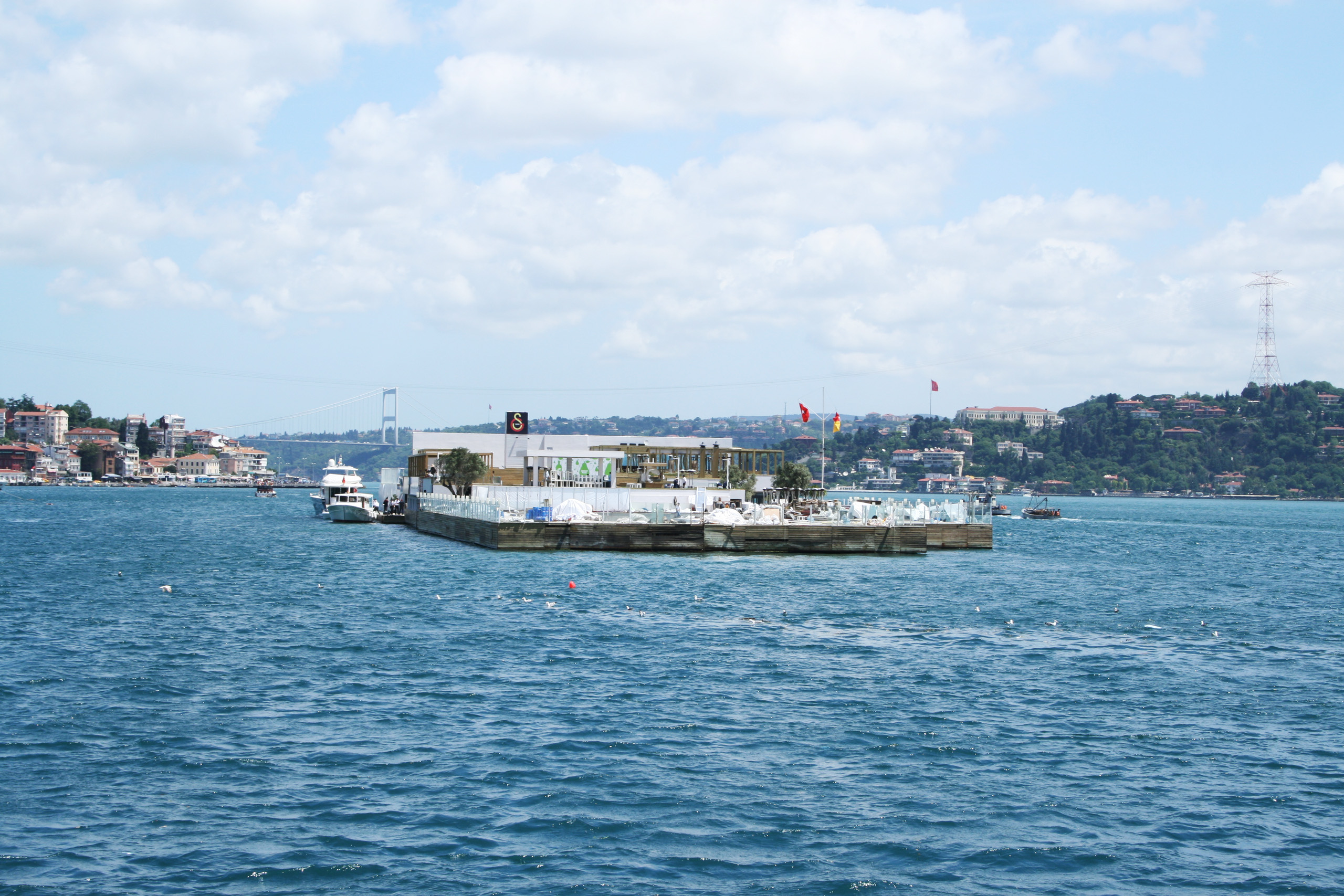 L'ile artificielle de Galatasaray dans le Bosphore